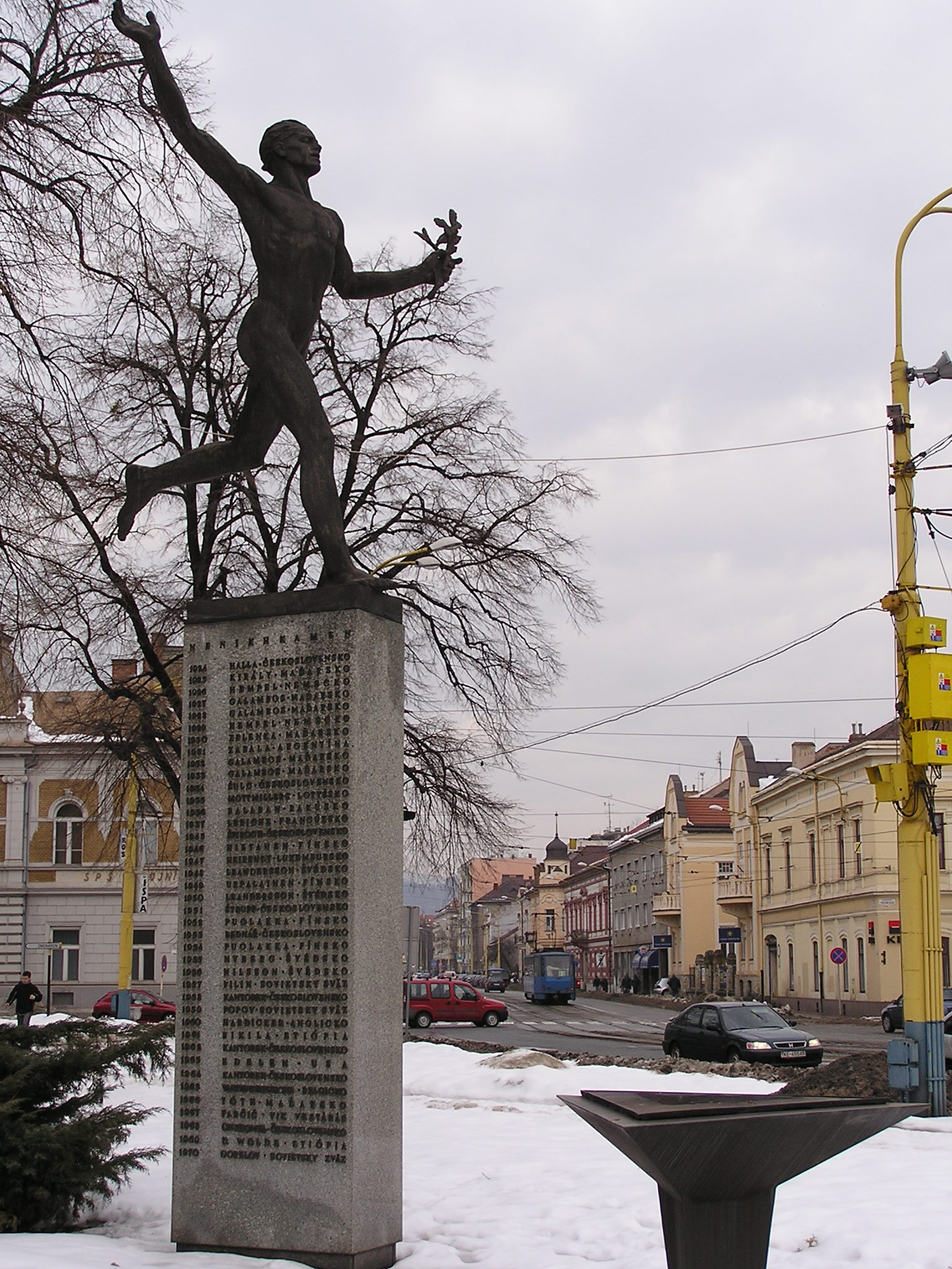 Pamätník maratónu mieru. Autorom sochy maratonca je sochár Arpád Račko.